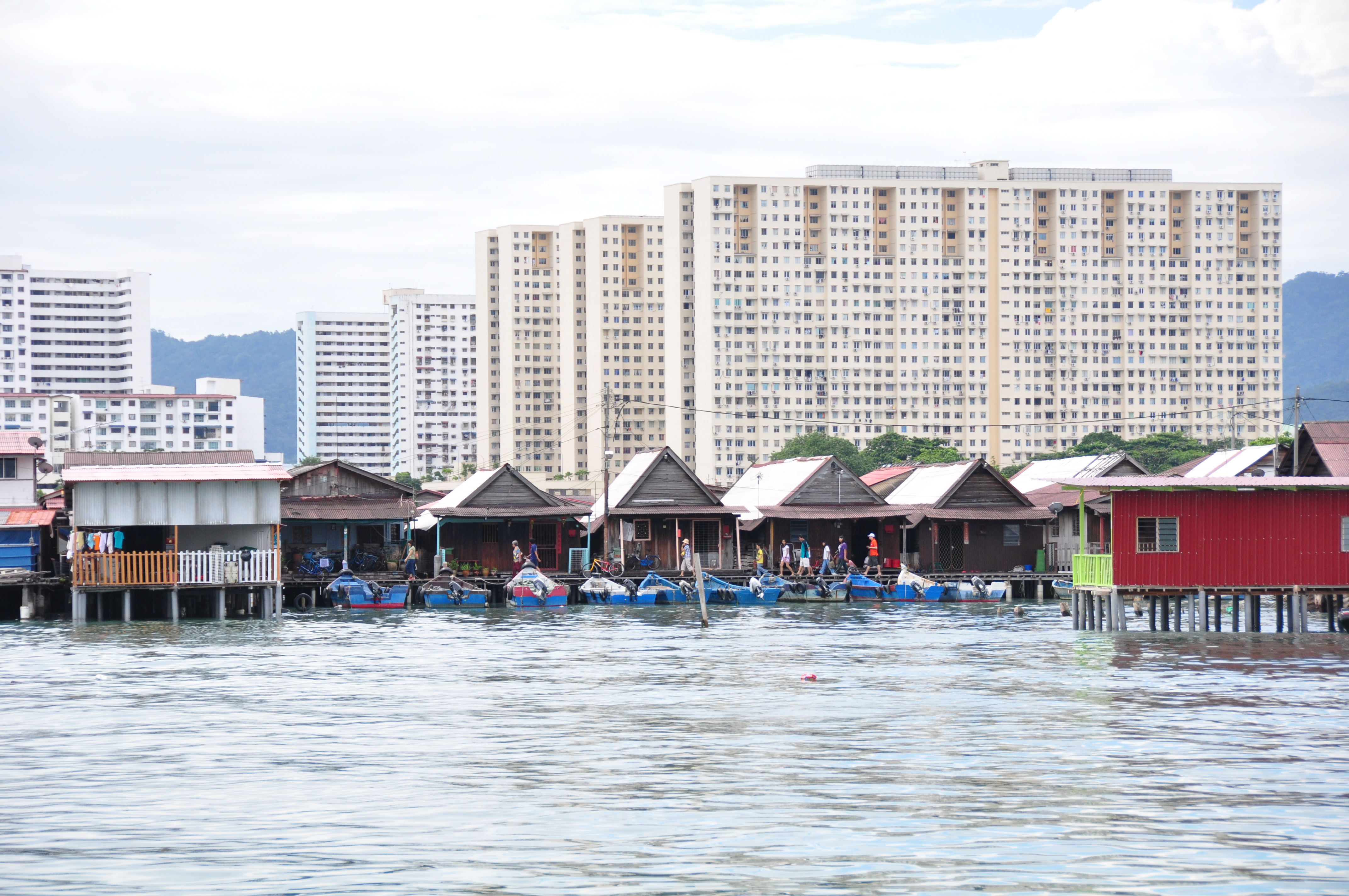 Clan Jetty